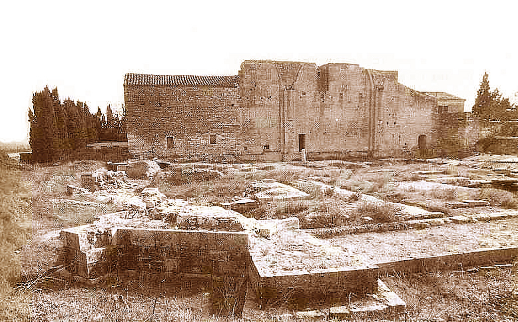 Ruines de l'abbaye de Psalmody au début du XXe siècle